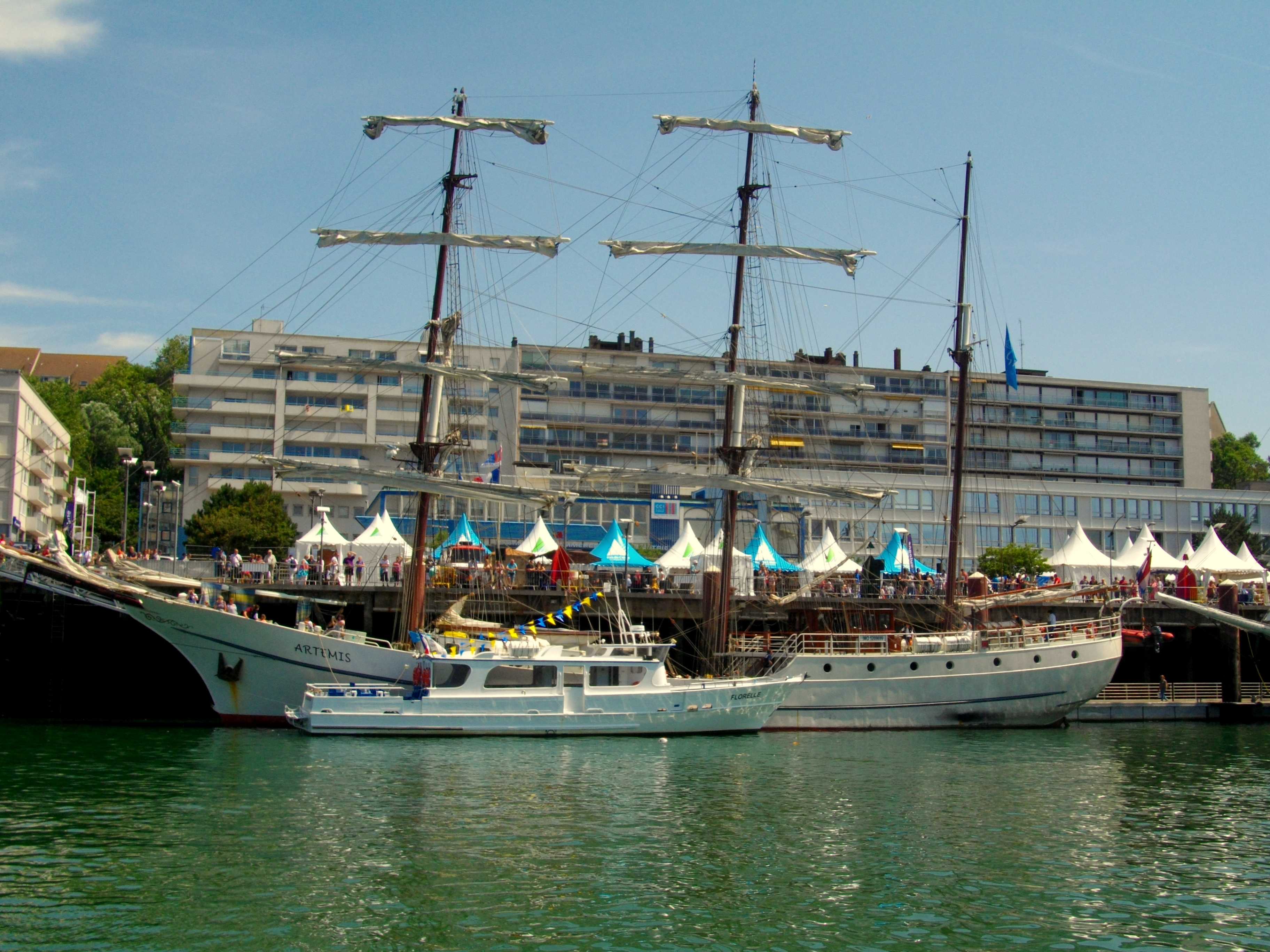 L' "Artémis" au quai Gambetta de Boulogne-sur-Mer, avec le "Florette" bateau-promenade du port